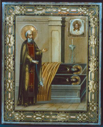 Преп. Сергий Радонежский перед гробами родителей